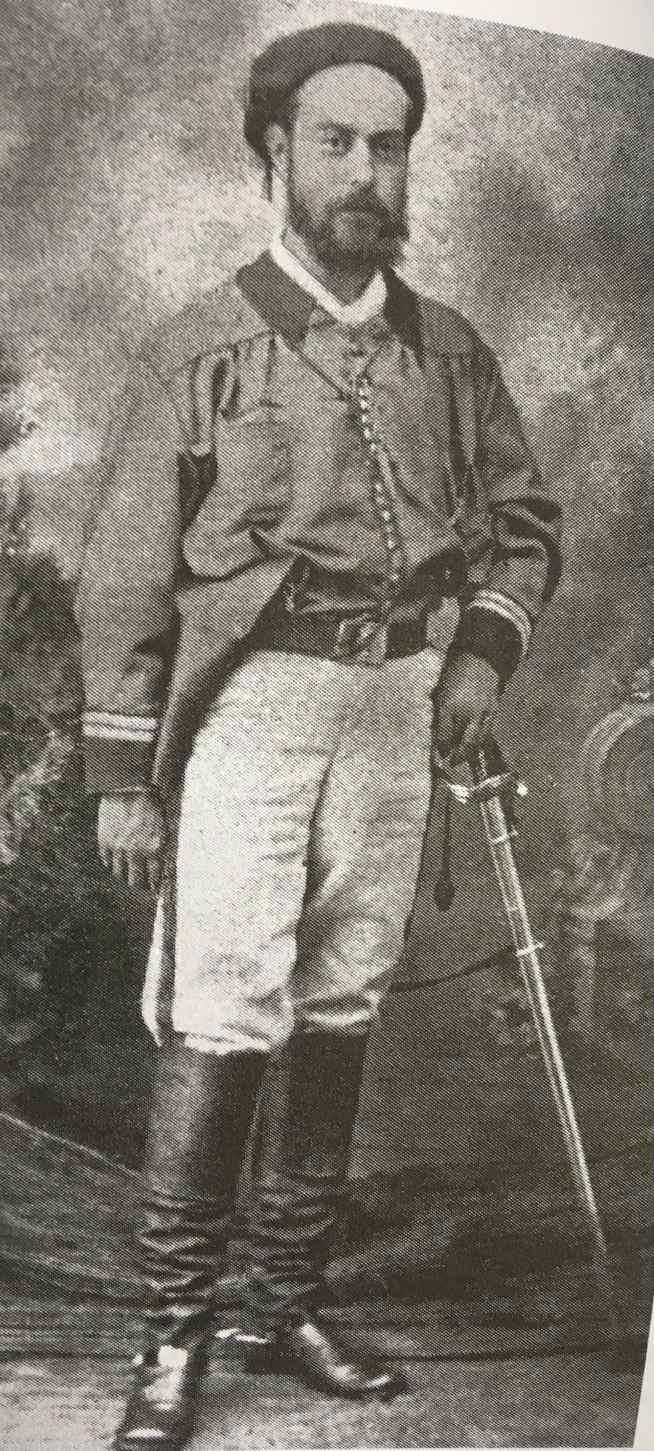 Ramón Sáenz de Inestrillas